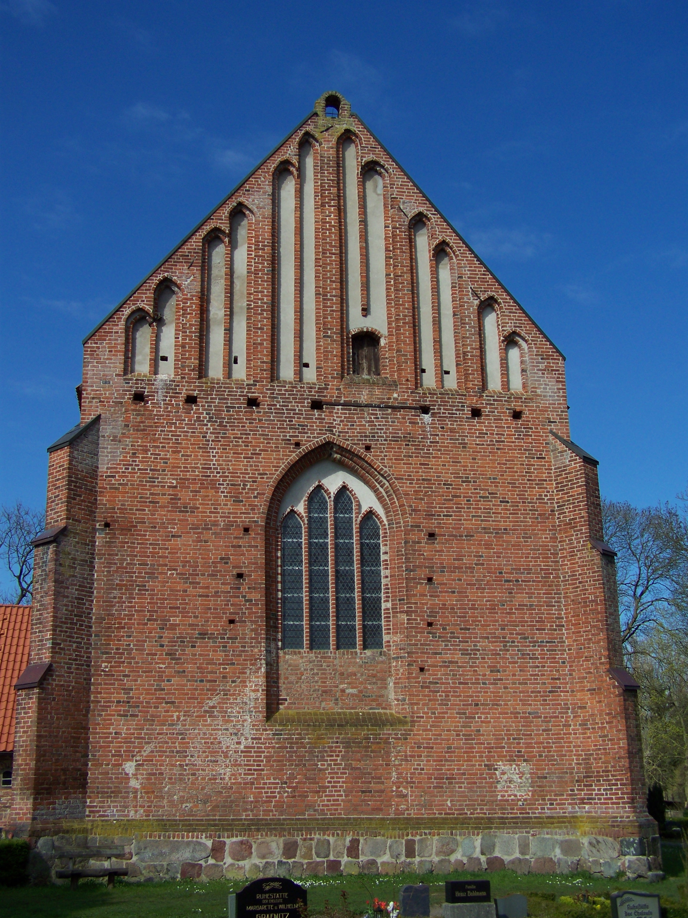 Steinhagen, Kirche - Ansicht Giebel des Schiffes (2008-04-20)